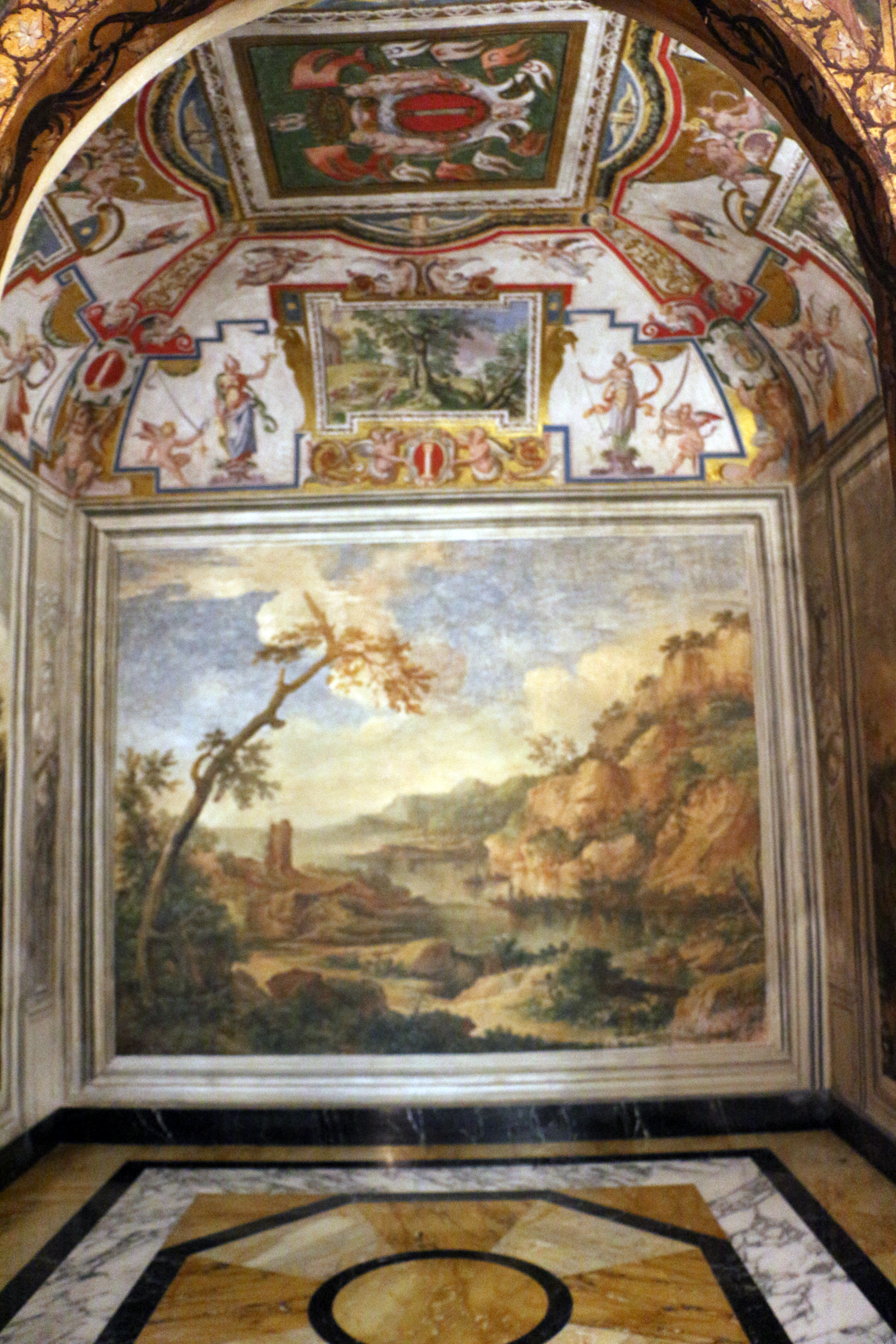 Palazzo colonna, appartamento della principessa isabelle, sala dell'alcova, stanzine con affreschi di crescenzo onofri 01.JPG